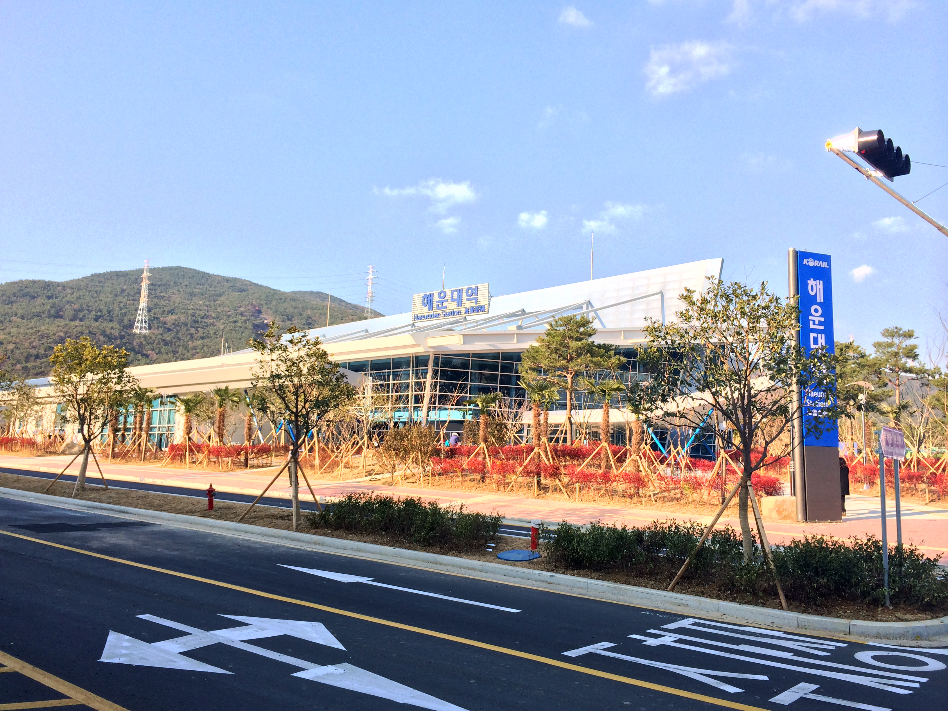 해운대역 역사 (전경)